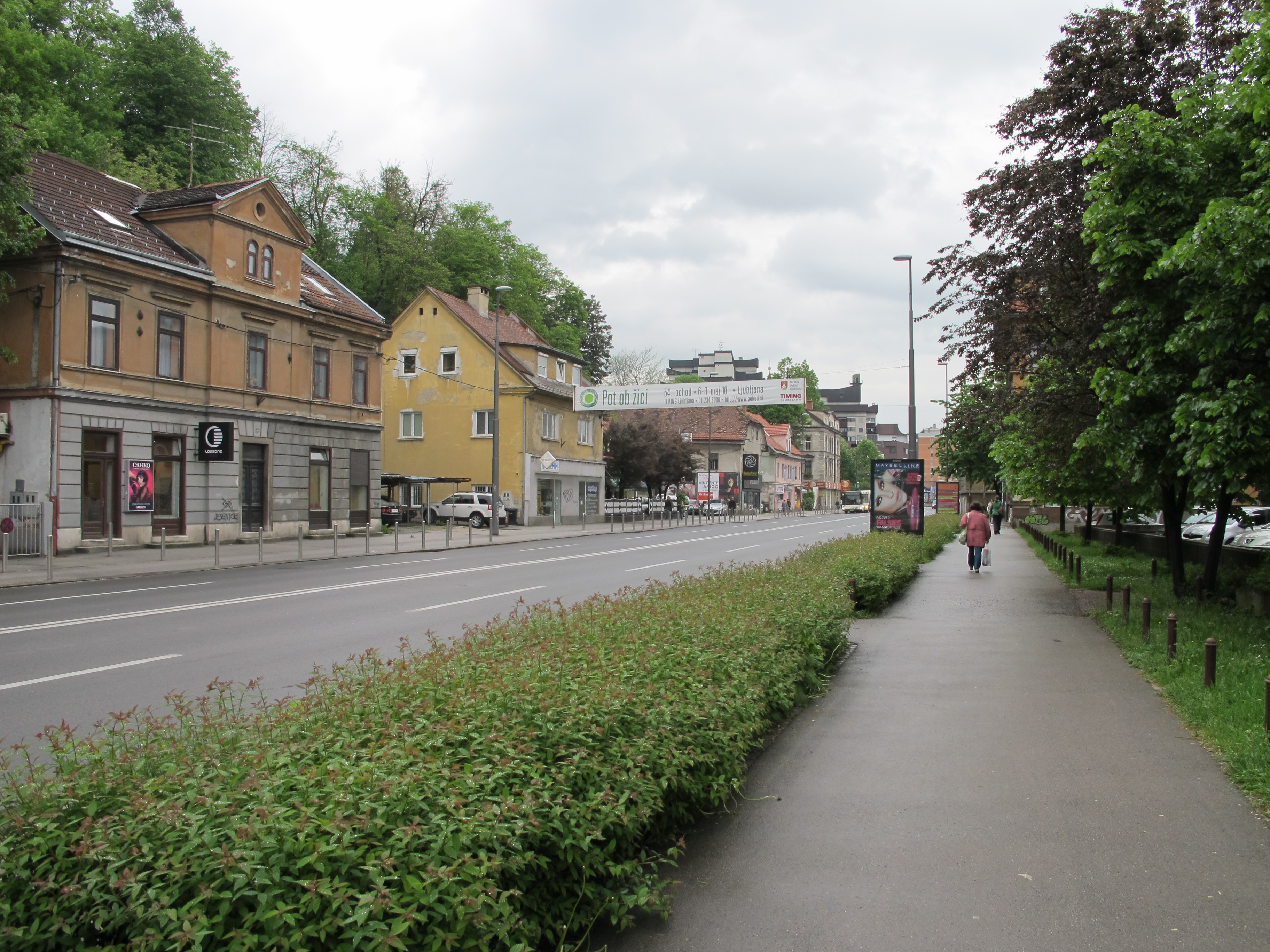 Celovška cesta